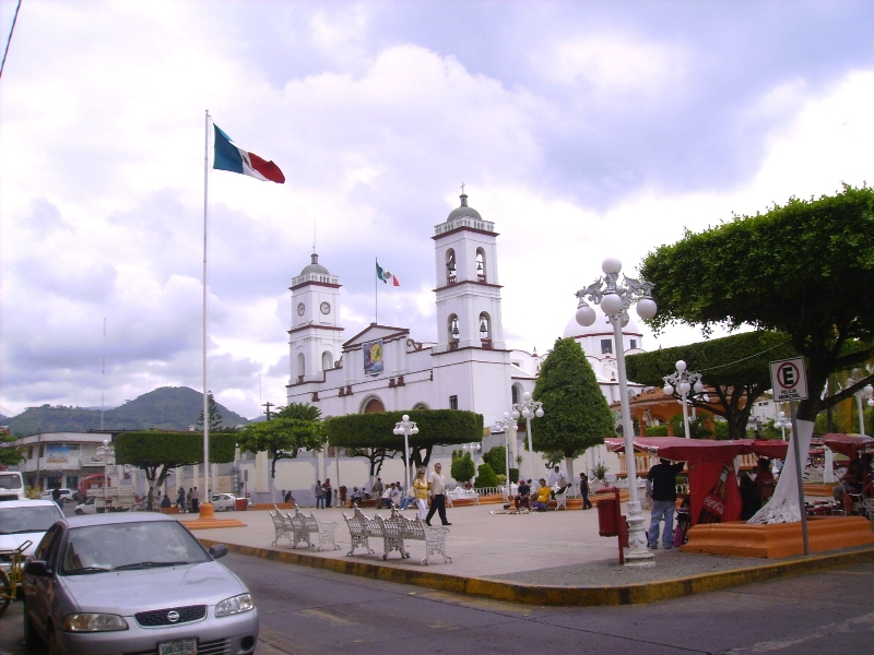 Imagen del centro de San Andres Tuxtla con la plaza Lerdo, con catedral y cerro del venado al fondo